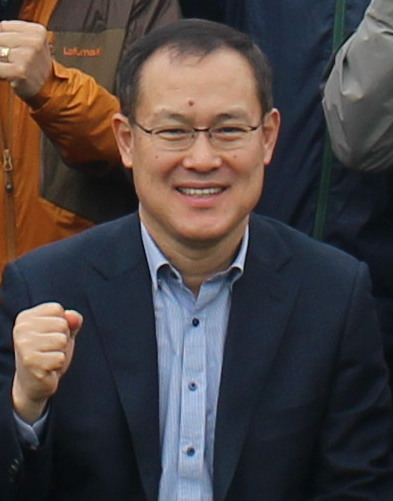 배진환, 2016년 10월 31일 제15회 강원119어울한마당 강릉소방서 단체 사진